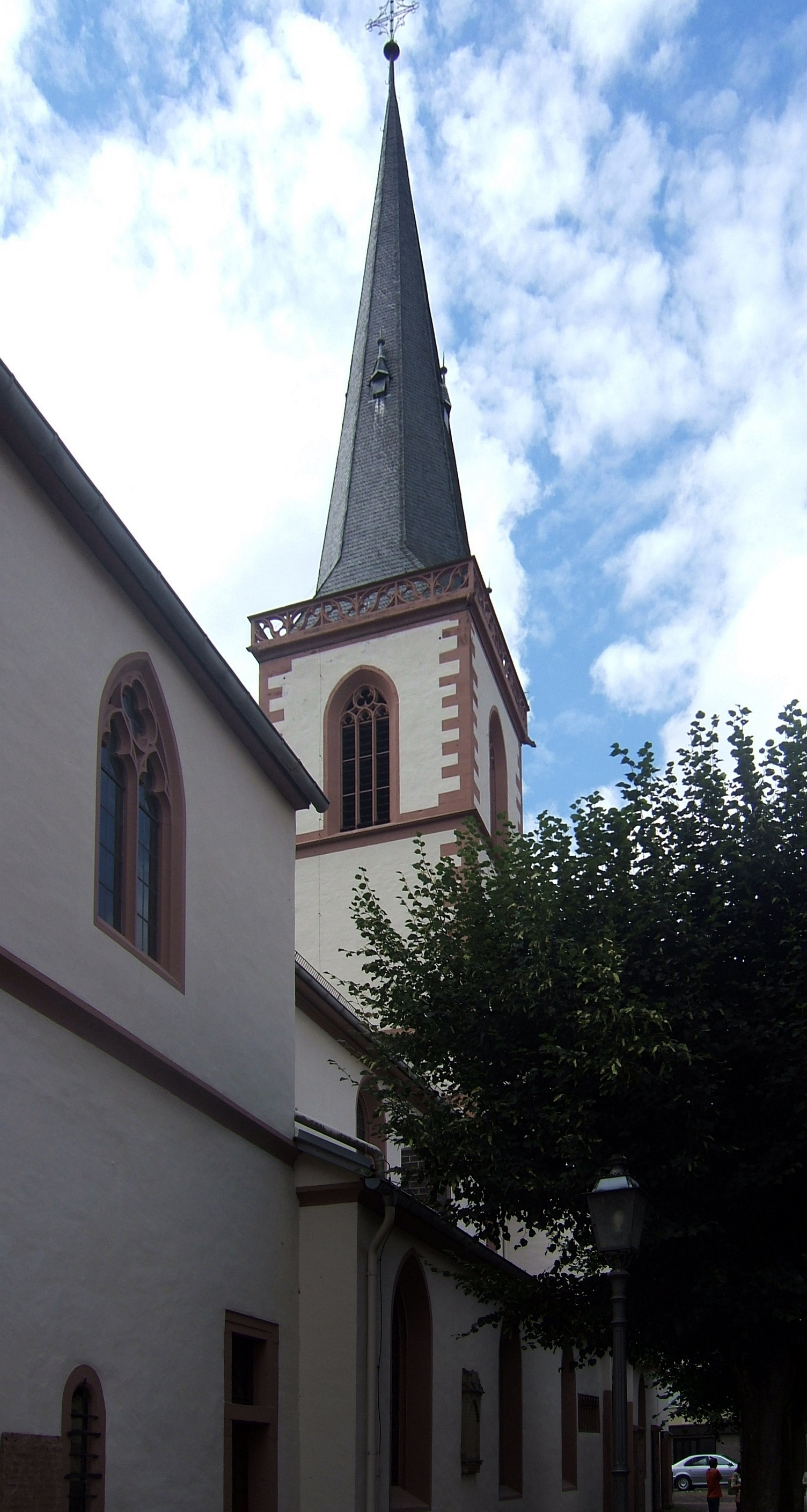 St. Michaelskirche in Lohr.